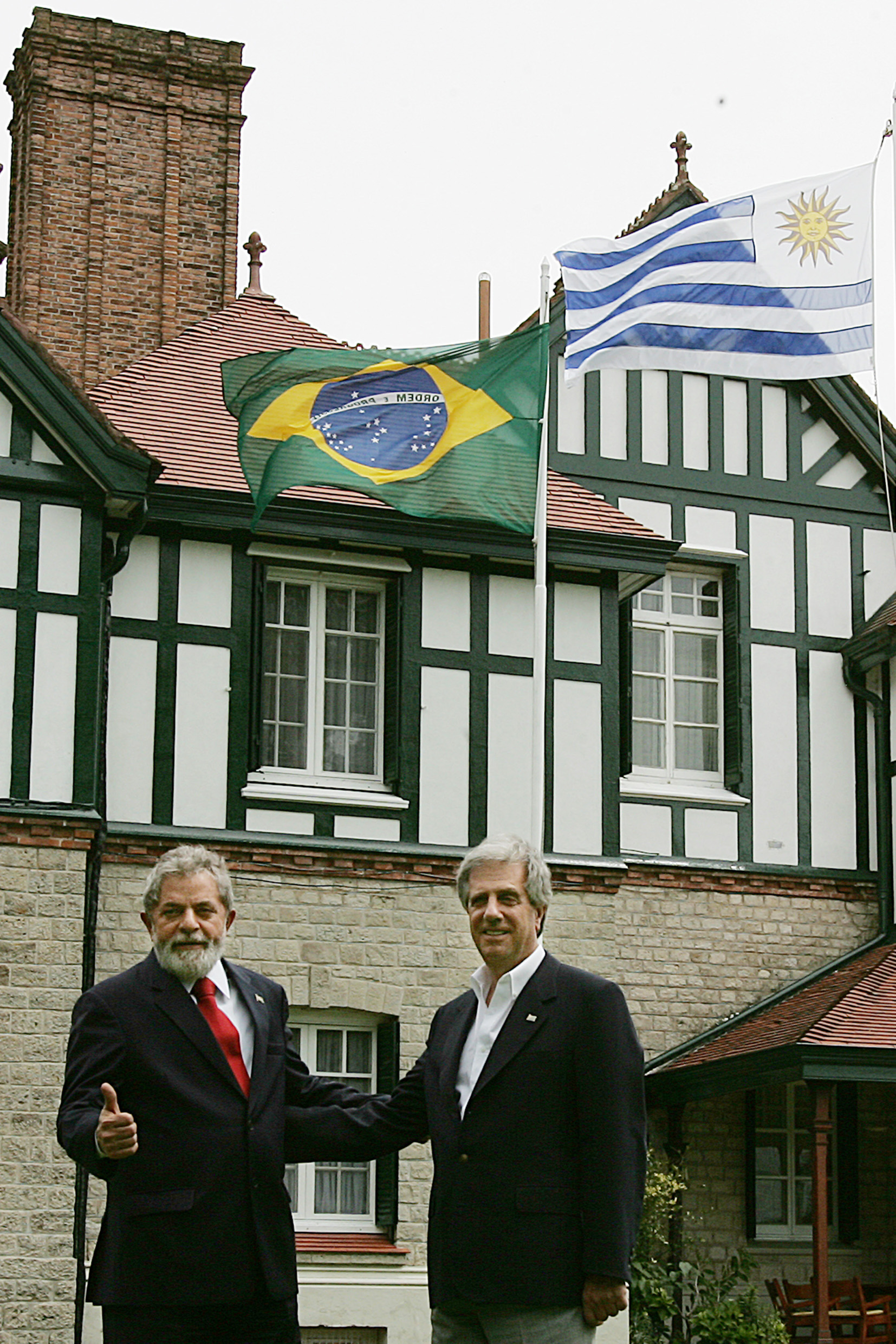 O presidente do Uruguai Tabaré Vázquez e do Brasil Luís Inácio Lula da Silva.